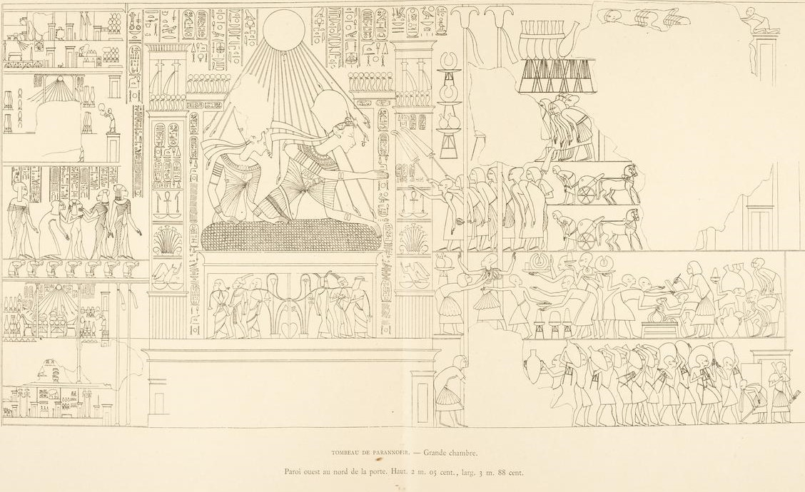 Grab des Parennefer in Amarna, Großer Raum. Westwand nördlich von der Tür. Höhe 2,03 m. Breite 3,88 m.Verteilung von Geschenken durch Echnaton und Nofretete. Sog. "Balkon- oder Fensterszene". Königspaar sehr schön bekleidet. Beschreibung in franz.: Tombeau de Paranofir – Grande Chambre. Parois ouest au nord de la porte. Haut. 2 m 03 cent. Larg. 3 m 88 cent